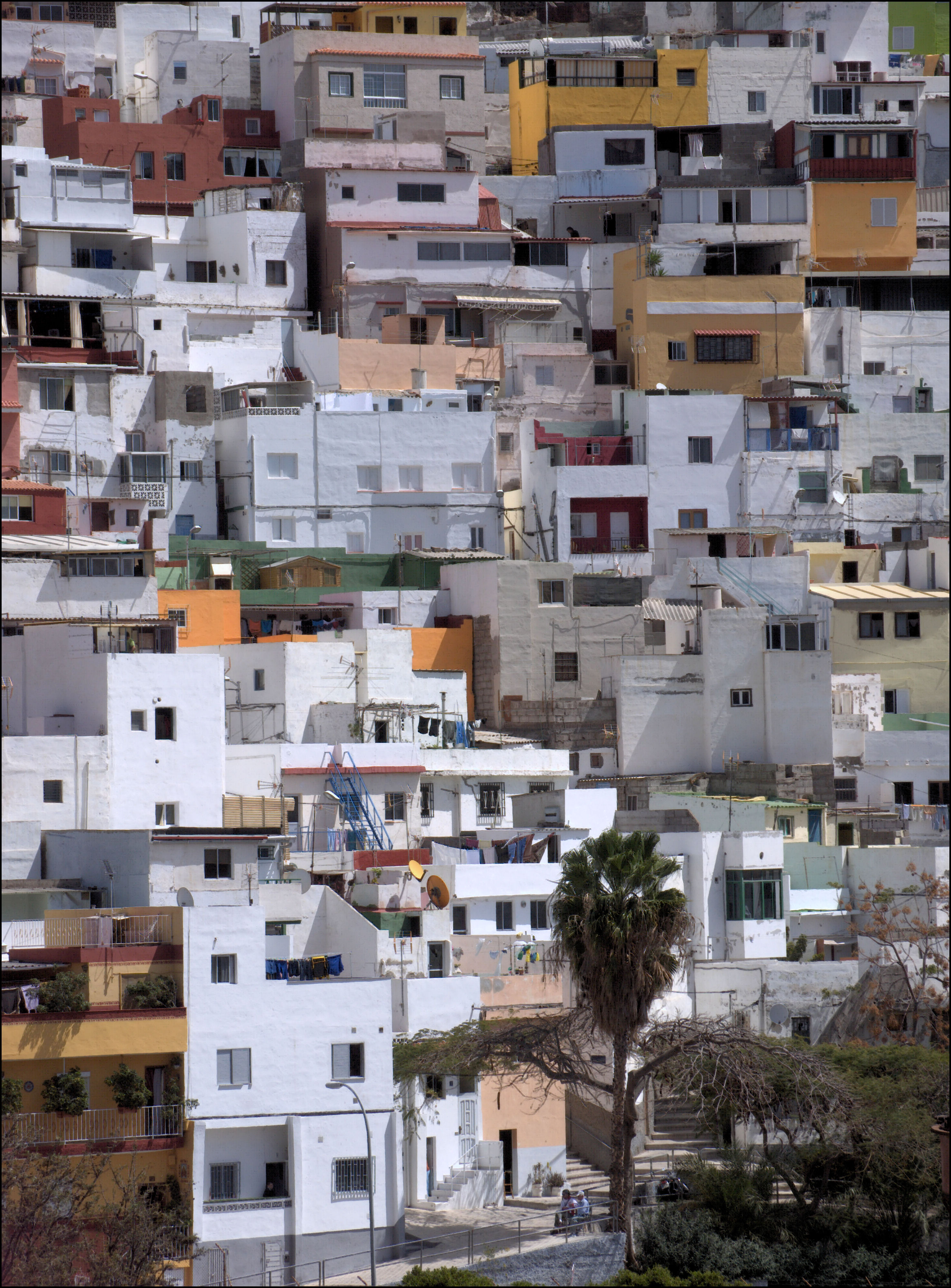 Vista del barrio de La Alegría en Santa Cruz de Tenerife